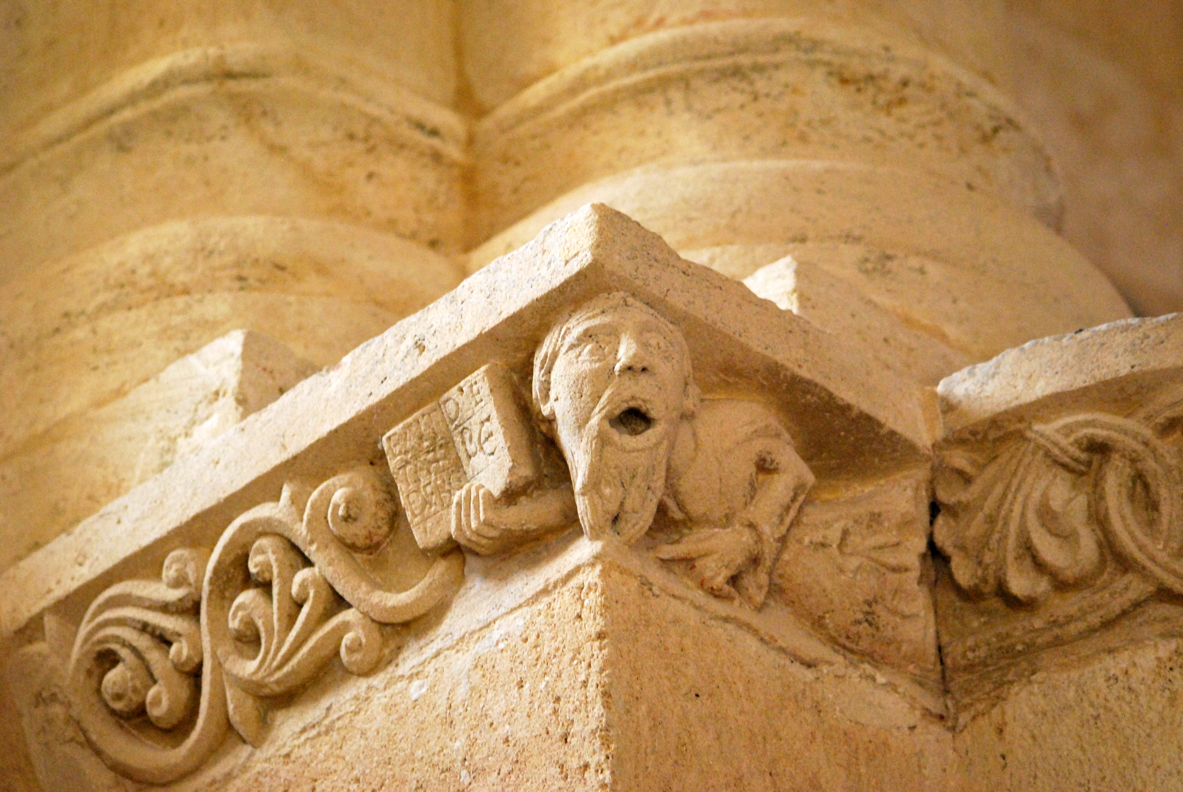 Église Saint-Quentin de Baron, Gironde